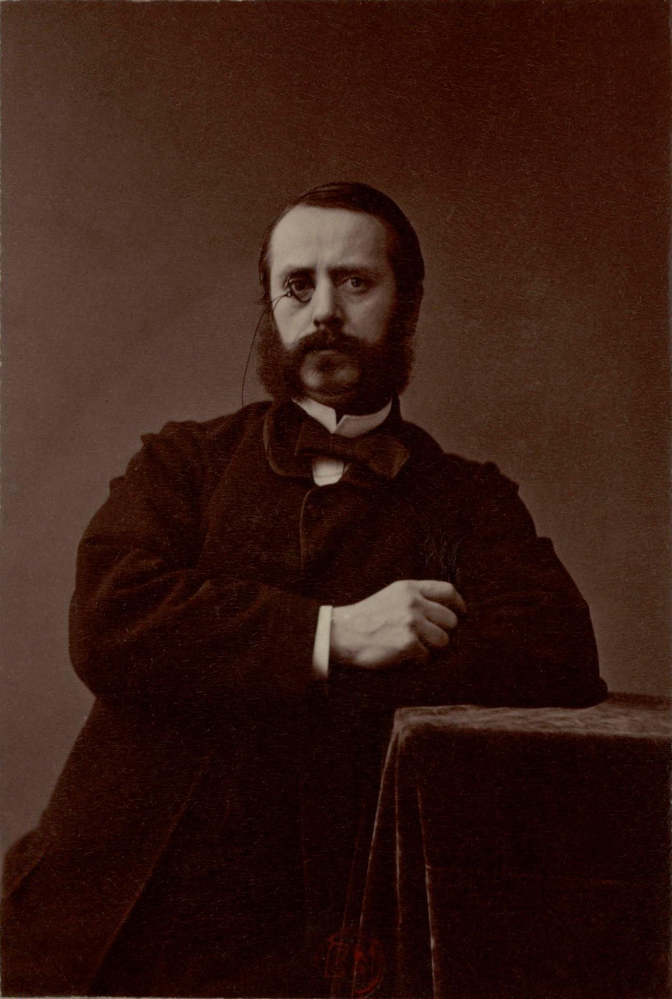 Retrato de Henri Alfred Darjou.